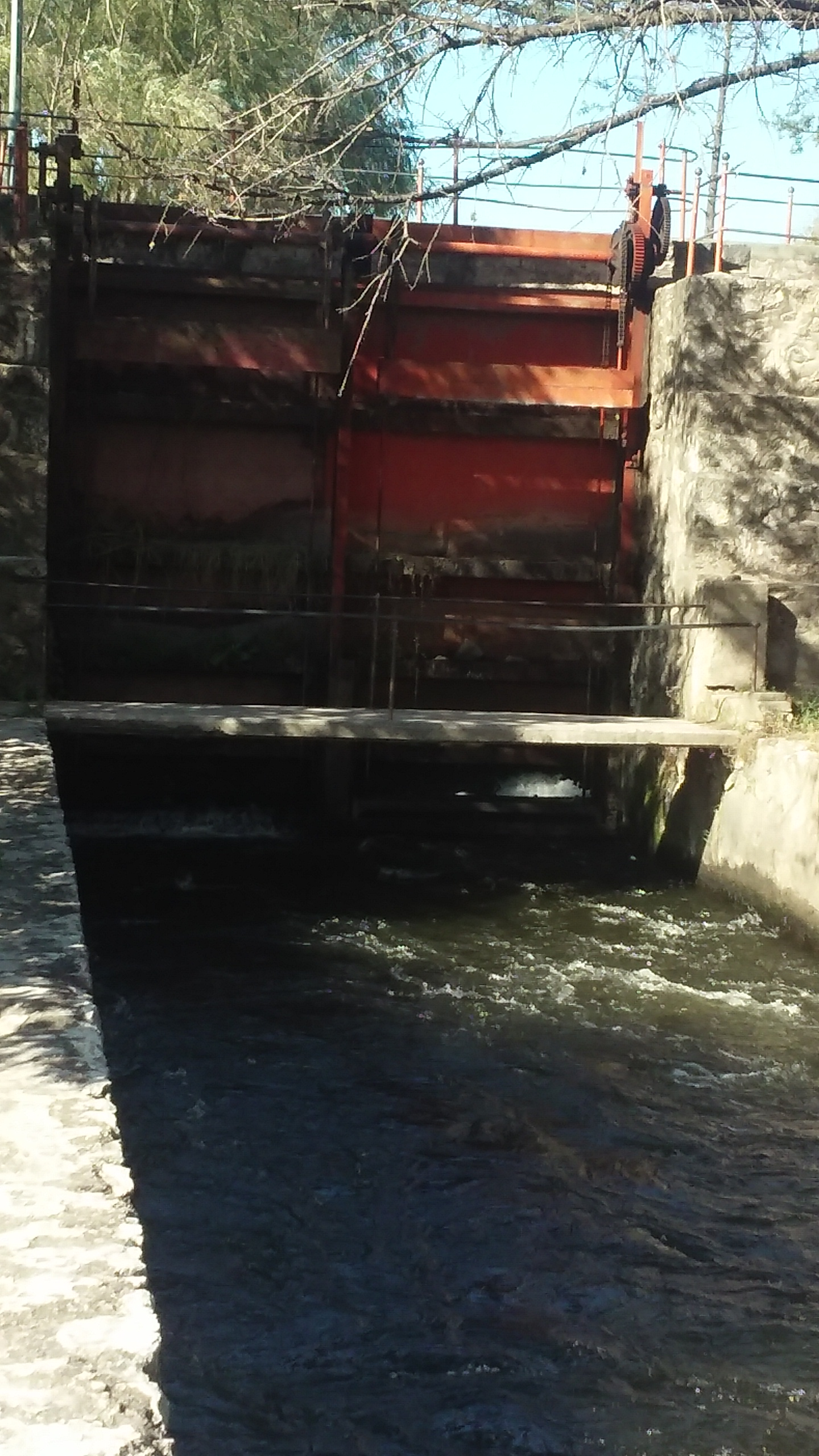 Vista de la compuerta que abre el paso al agua para que discurra por el canal maestro norte